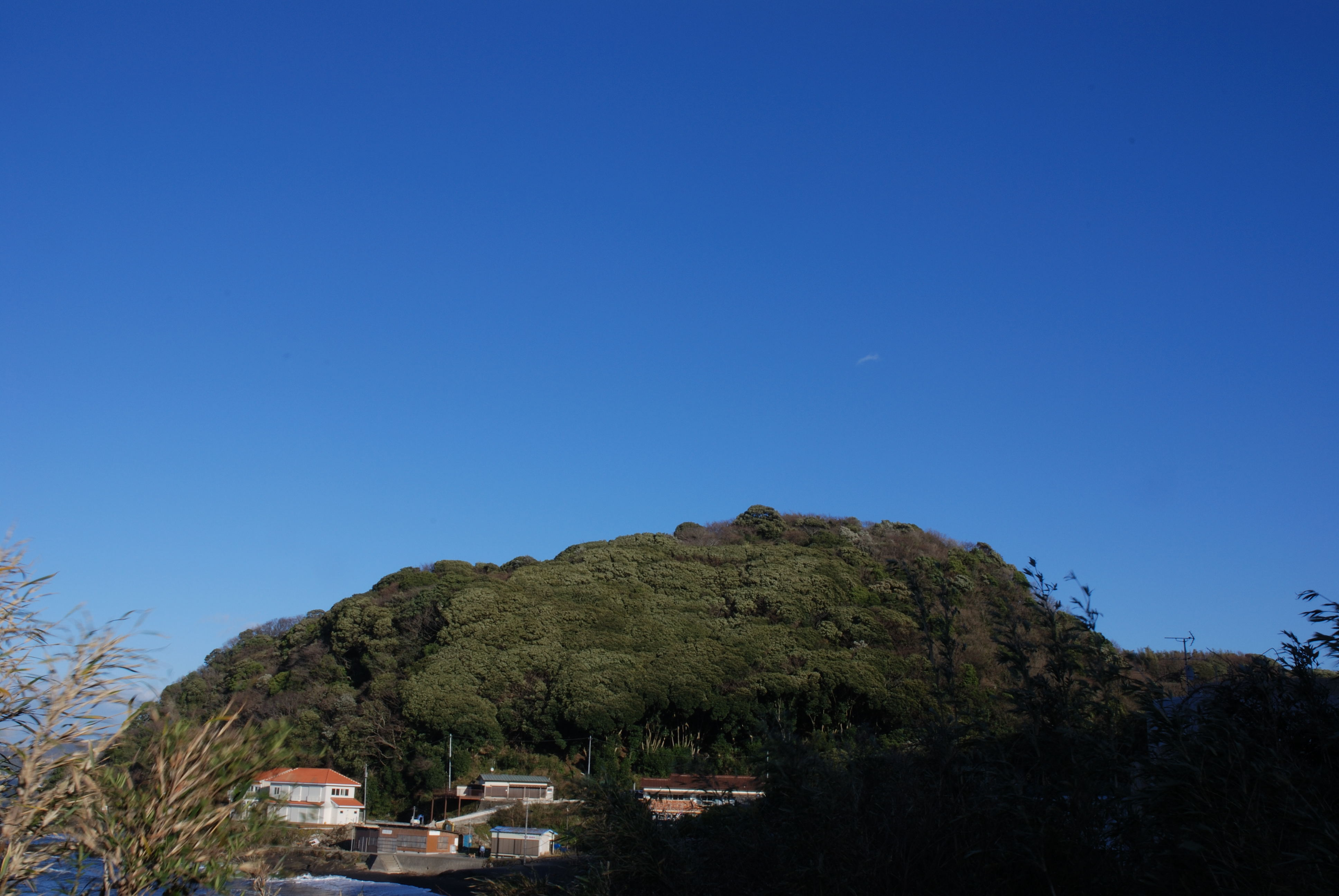 Tsukuroumi Castle